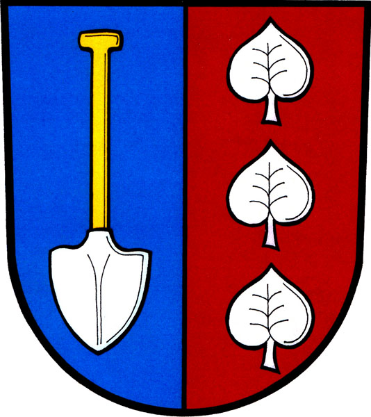 Znak obce Libníkovice